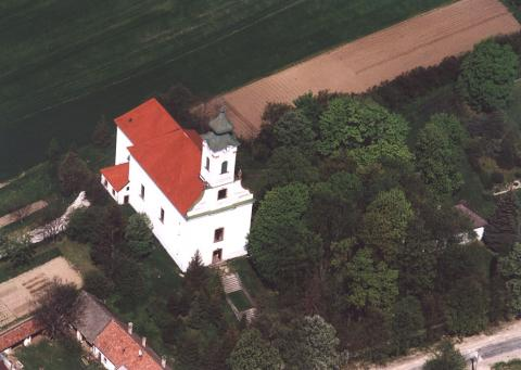 Pula, Hungary, aerialphotography. Borromei Szent Károly római katolikus templom